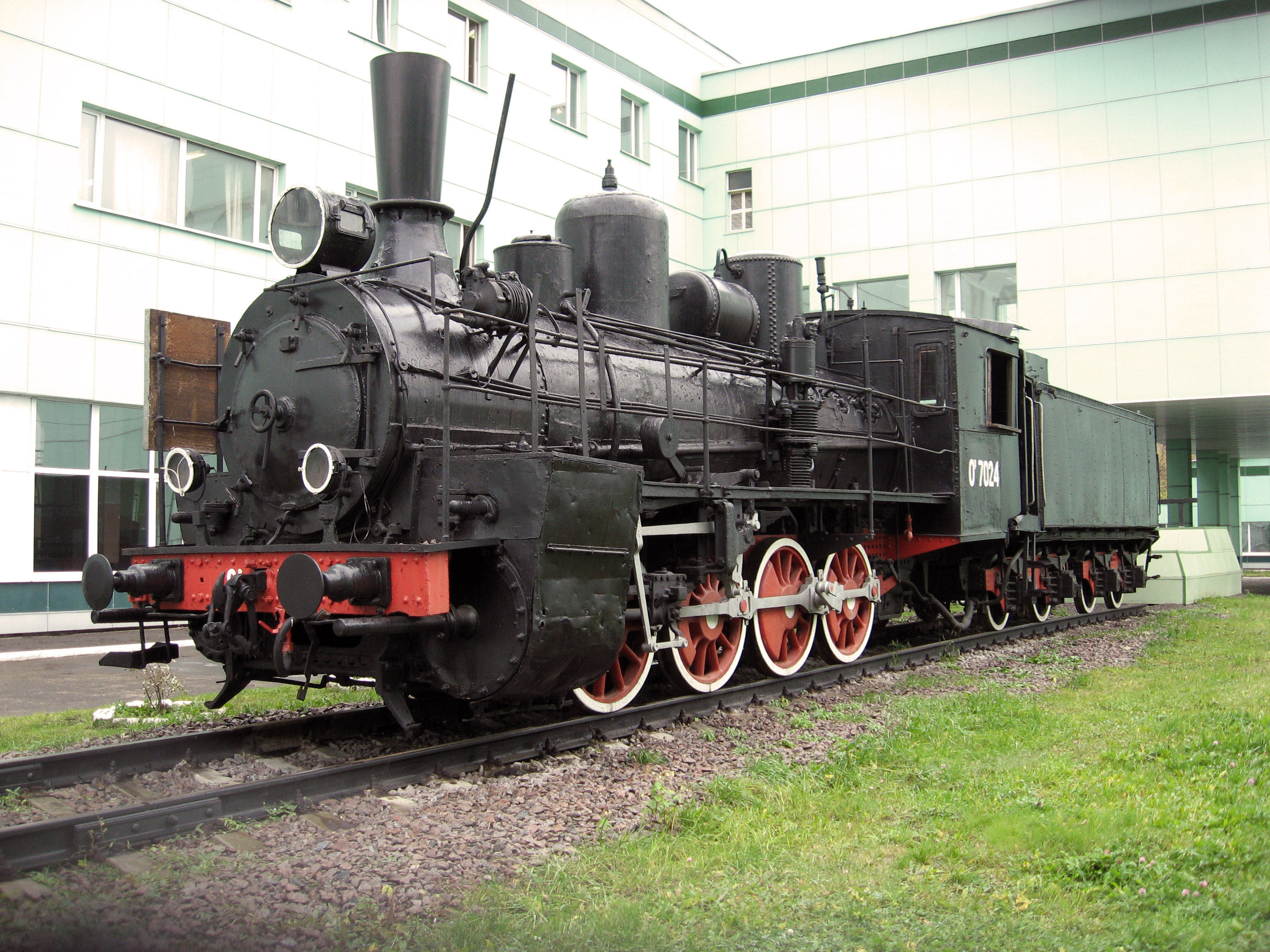 Паровоз-памятник "Ов-7024".Локомотивное депо "Москва-Сортировочная".(Москва.Россия).